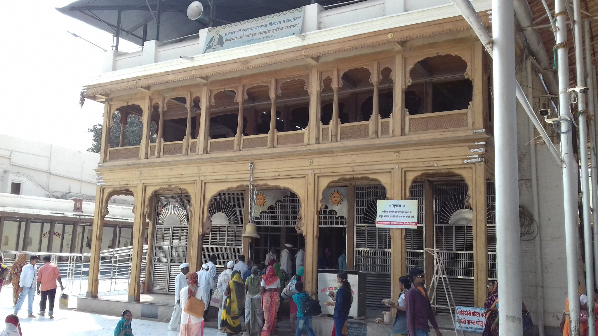 संत एकनाथ समाधी मंदिर, पैठण